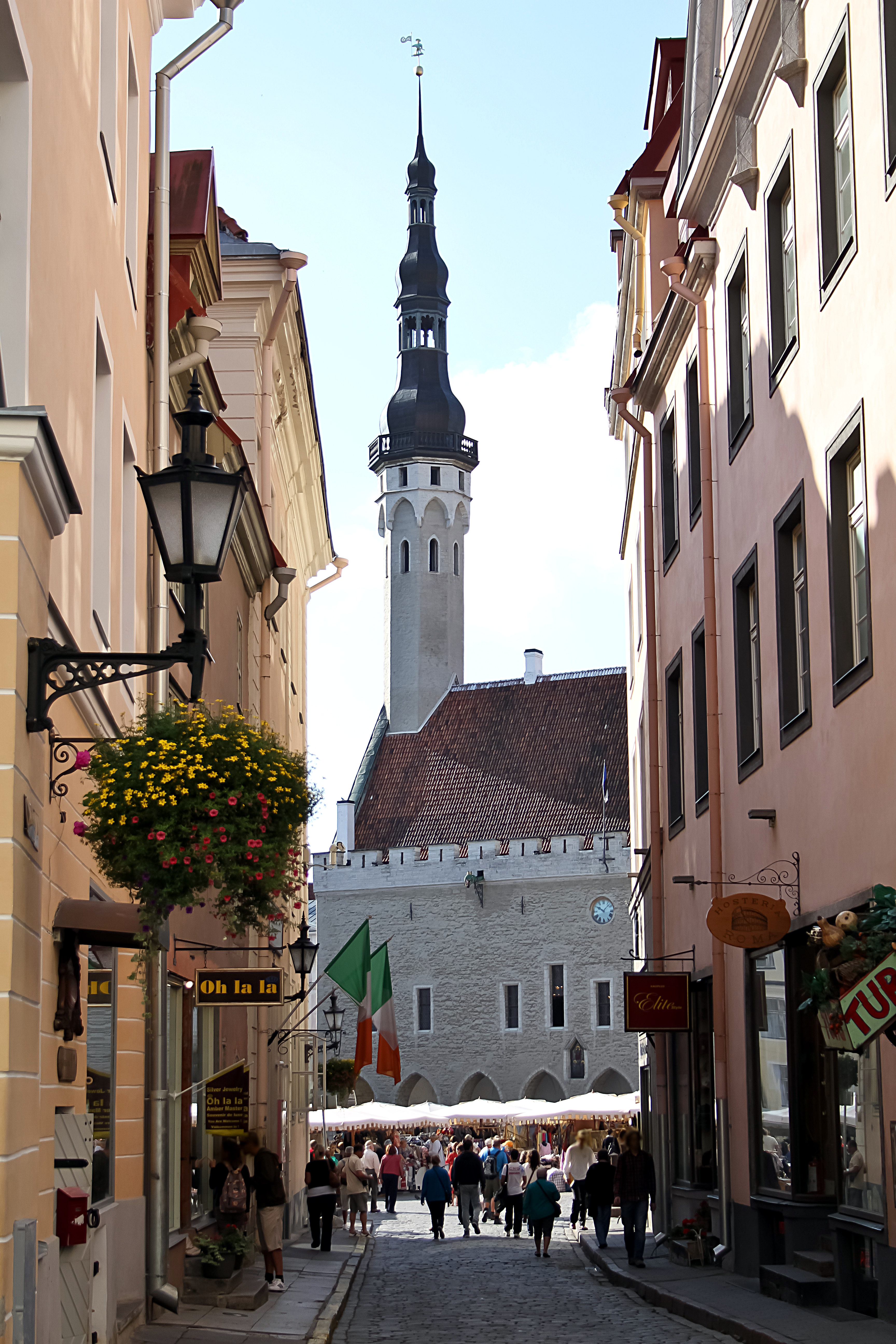 Reval